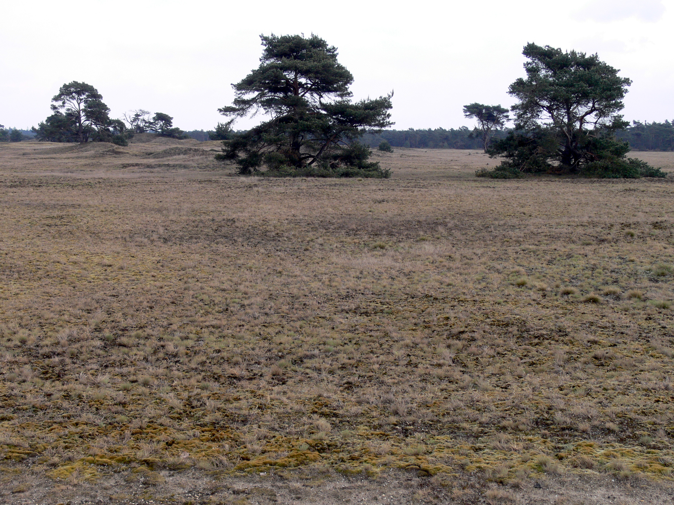 Paysage du Hoge Veluwe (Nationaal Park De Hoge Veluwe) , parc naturel national des Pays-Bas, qui offre au public - sur entrée payante - environ 5000 ha (précisément 54,5 km² ) de nature restaurée sur une ancienne zone agricole rachetée et boisée par deux riches néerlandais au début du siècle. Ce parc abrite des paysages exceptionnels, et bien que clôturé est un des grands noyaux du réseau écologique néerlandais. Il abrite de nombreuses espèces protégées et a contribué par son Centre d'interprétation à sensibiliser plusieurs millions de personnes à la rsetauration et protection de l'environnement et plus particulièrement à la restauration de la naturalité des paysages, qui est caractéristique de ce site. Sur les zones ouvertes, les arbres ont une forme particulière liée notamment au vent et aux microclimats, ainsi qu'à la faune qui les "sculptent"